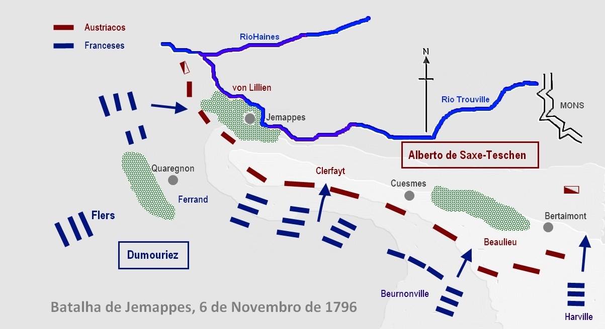 Dispositivo das forças na Batalha de Jemmapes (6 de Novembro de 1792)